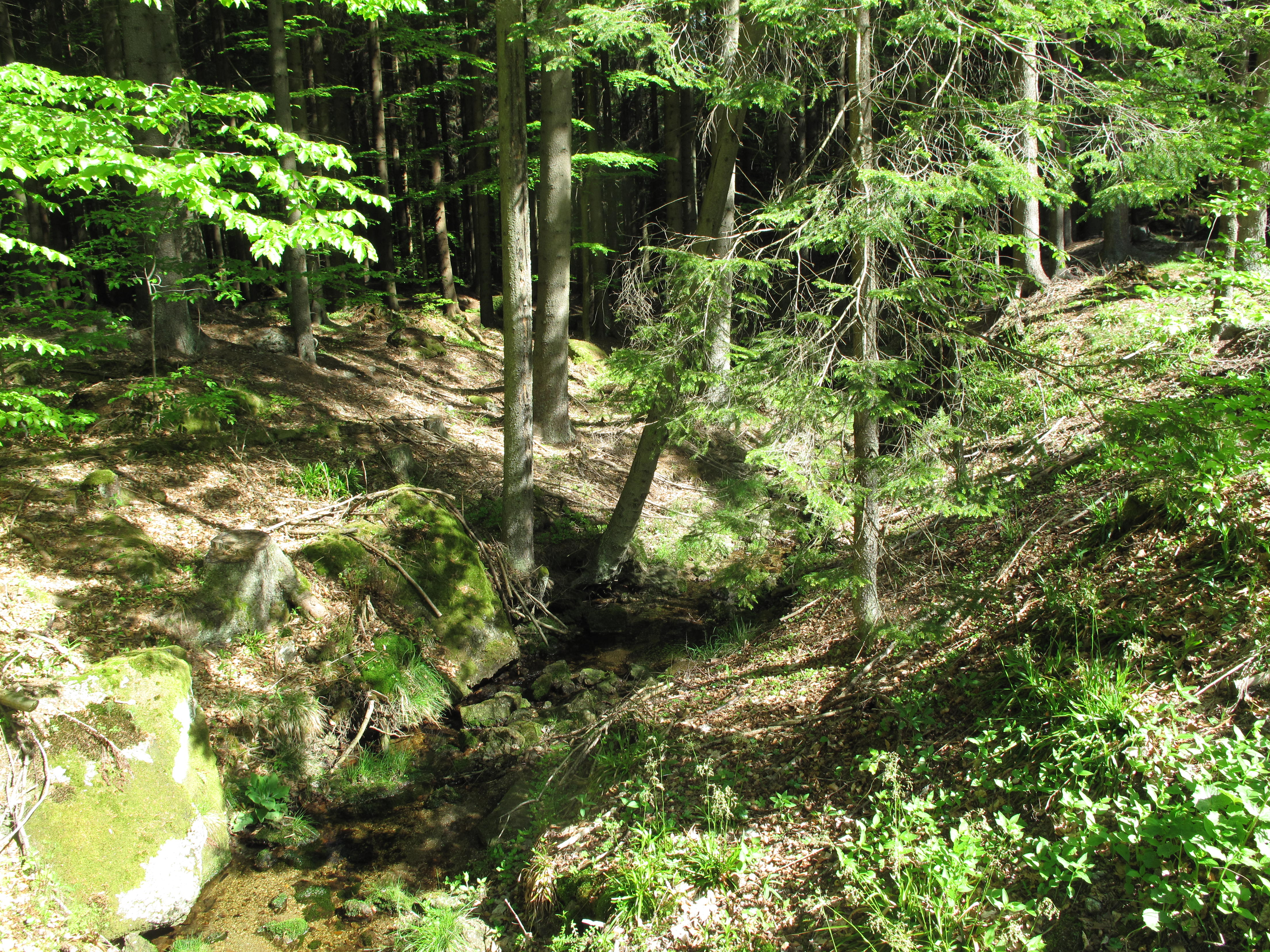 Kabelský potok u Ulrichova